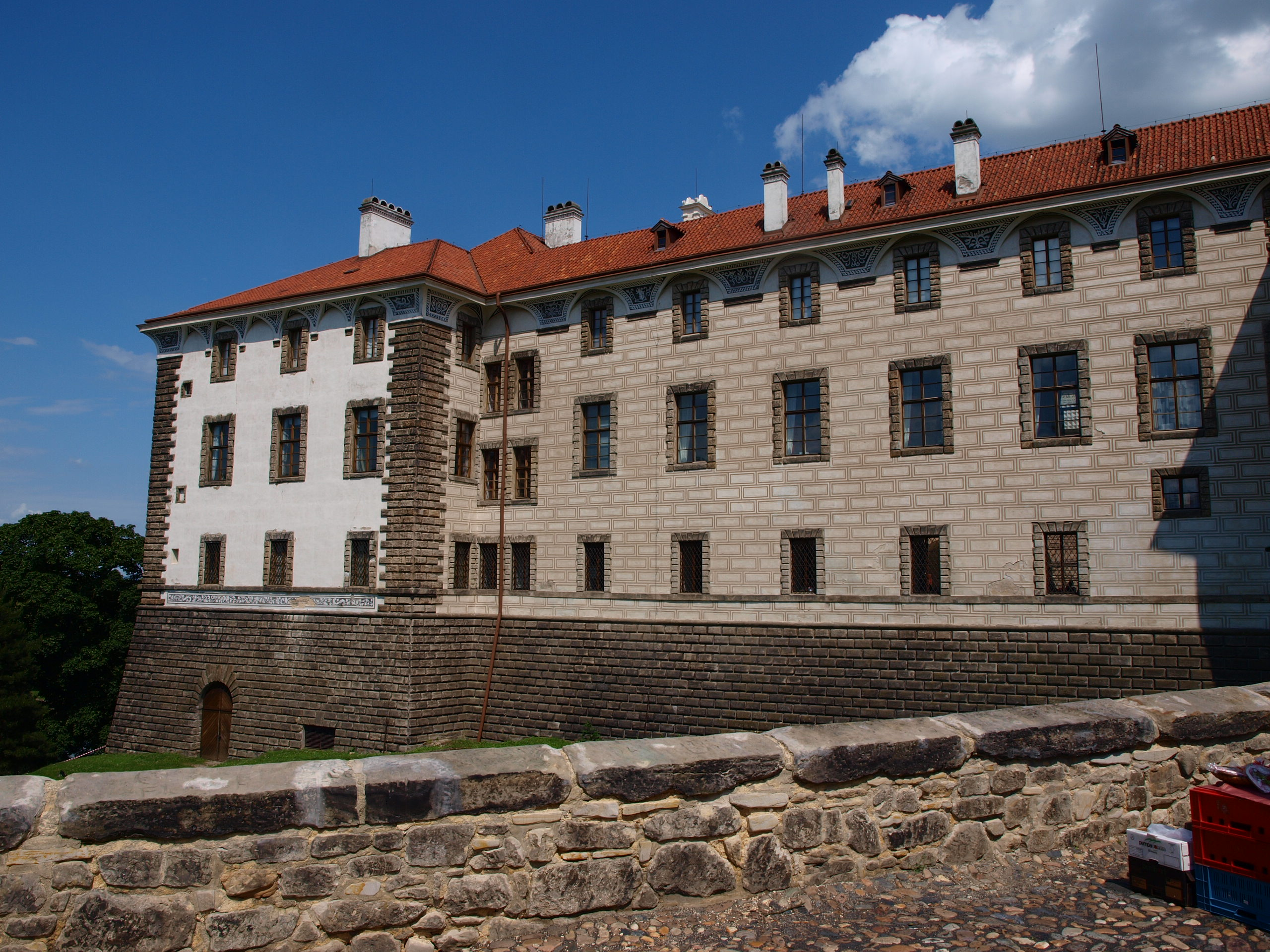 Zámek Nelahozeves